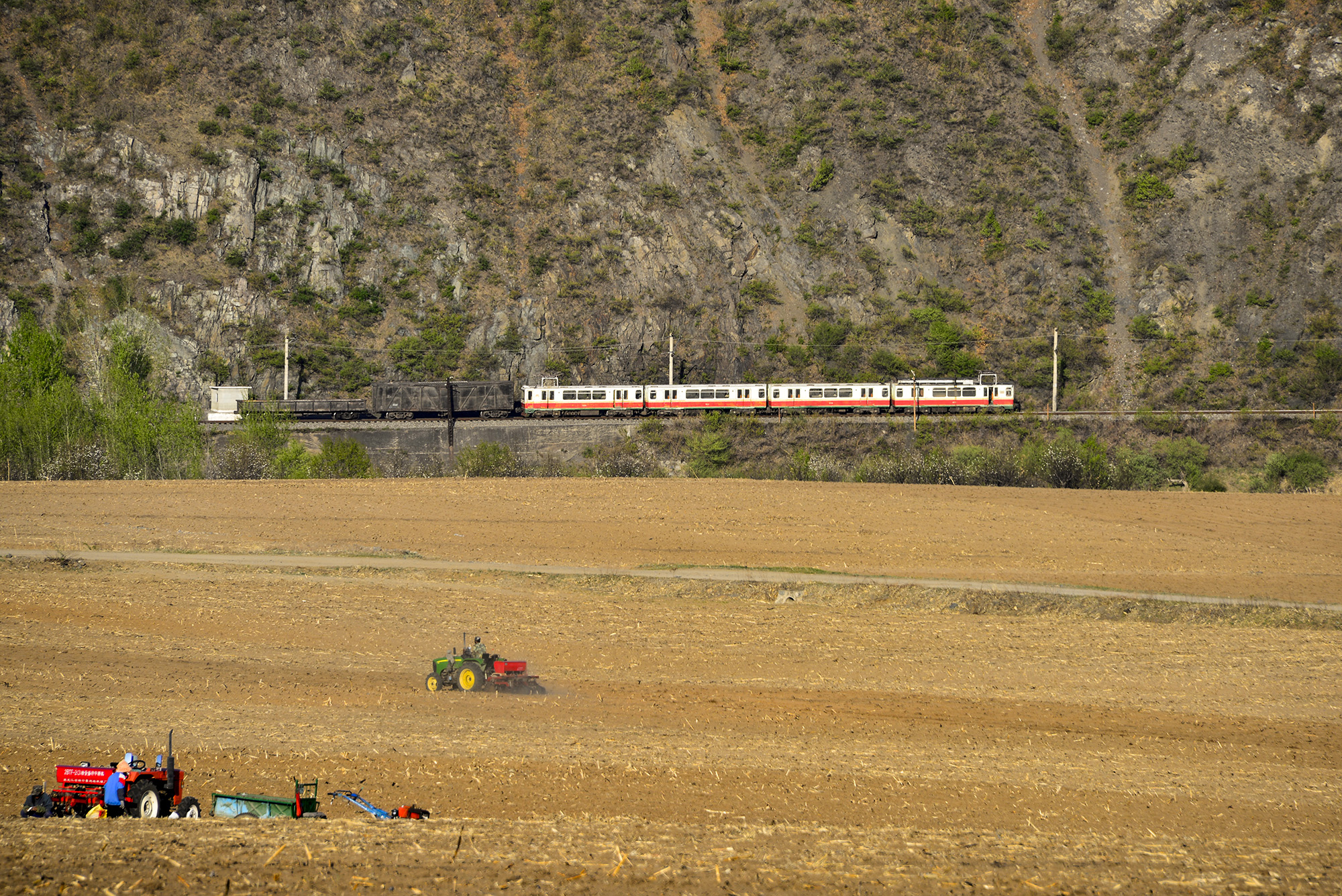 photo by Xundaogong 巡道工出品 中朝边境朝鲜火车